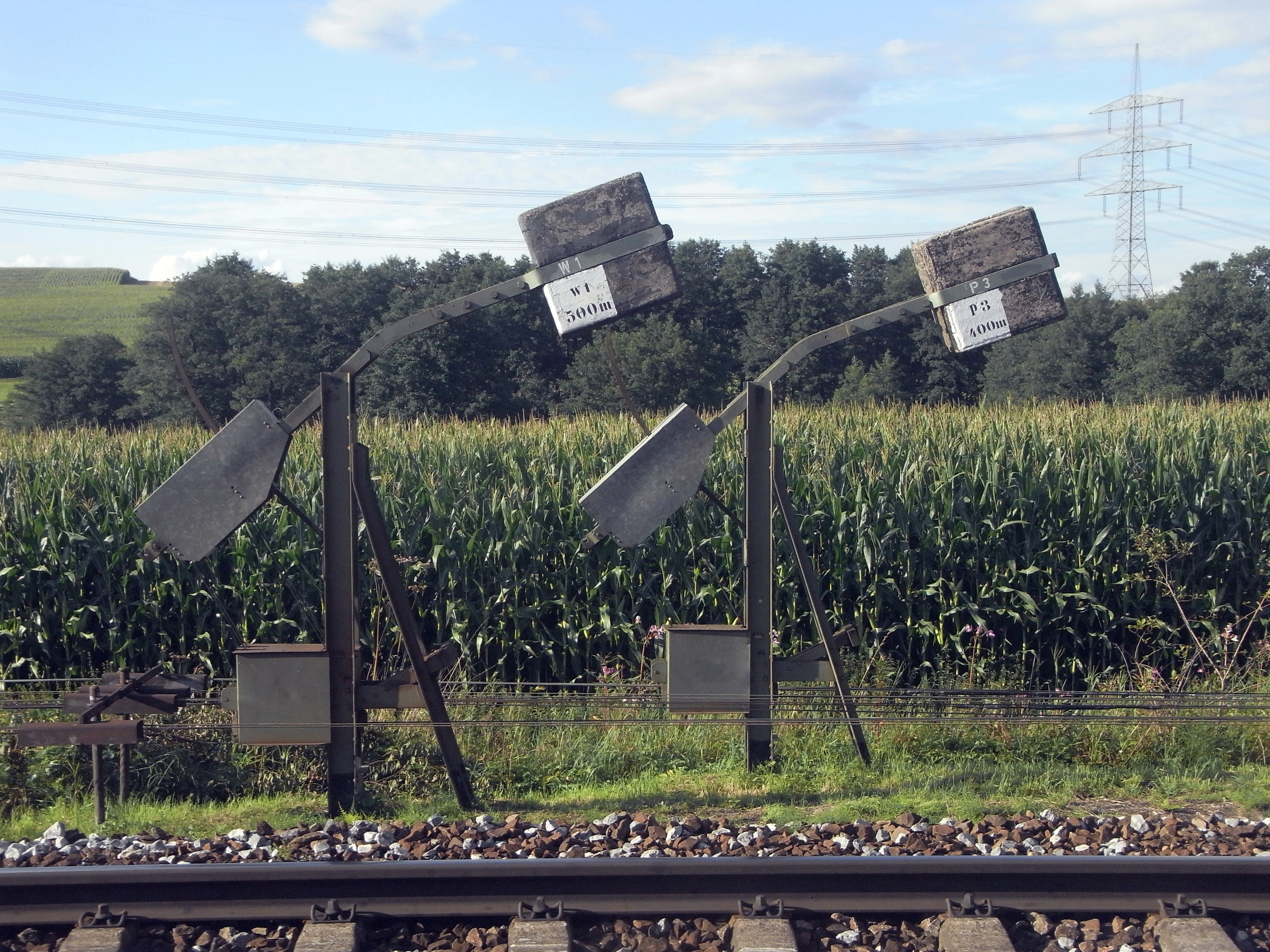 Zwei Außenspannwerke für Drahtzugleitungen im Bahnhof Thann-Matzbach (Oberbayern).